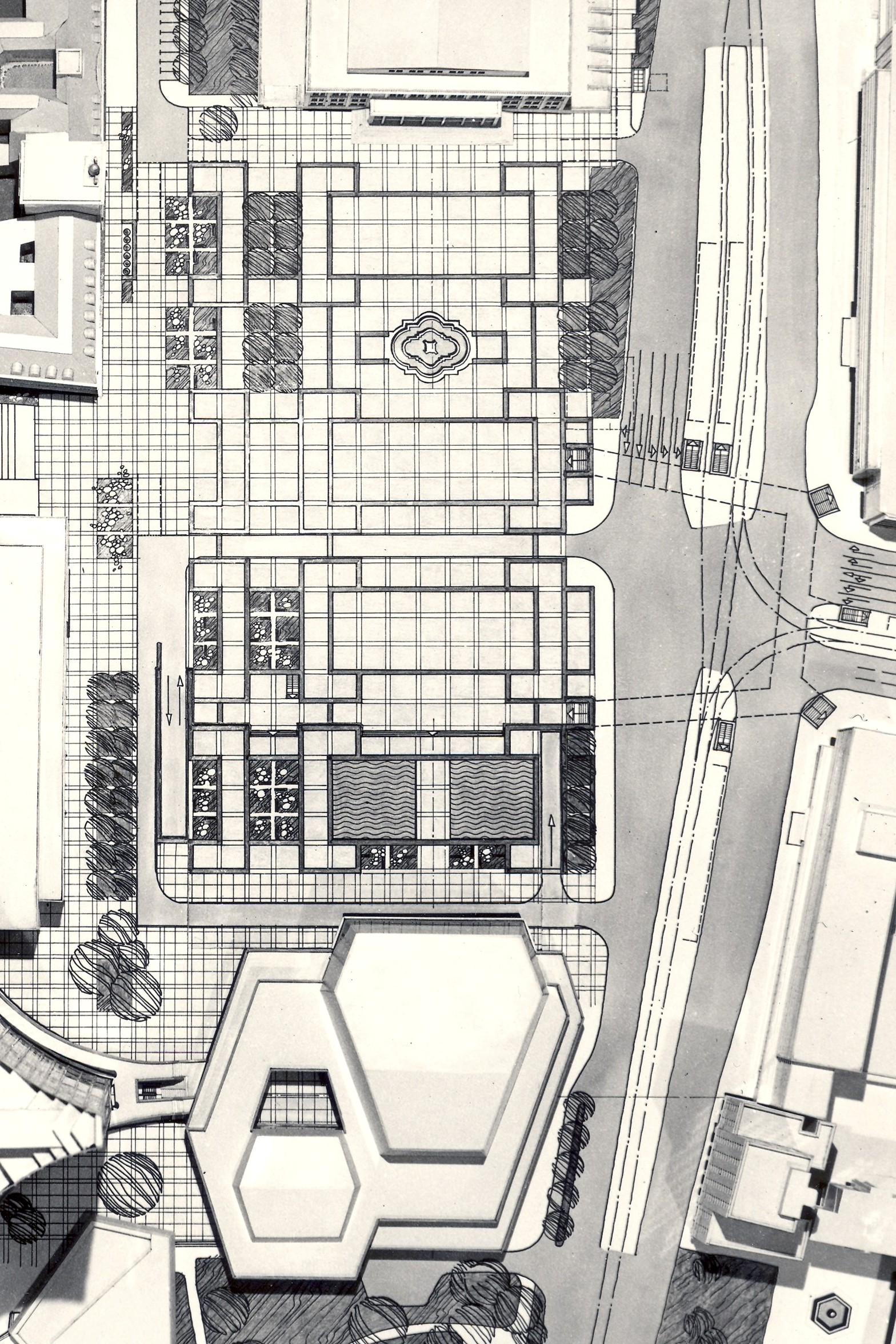 Leipzig; Neues Gewandhaus; Lageplan (Arbeitsstand März 1976